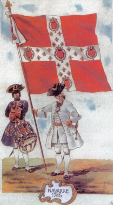 Officier porte drapeau de l'enseigne régimentaire du Régiment de Navarre en 1745 avec tambour régimentaire, même époque. Lithographie de Rigo.